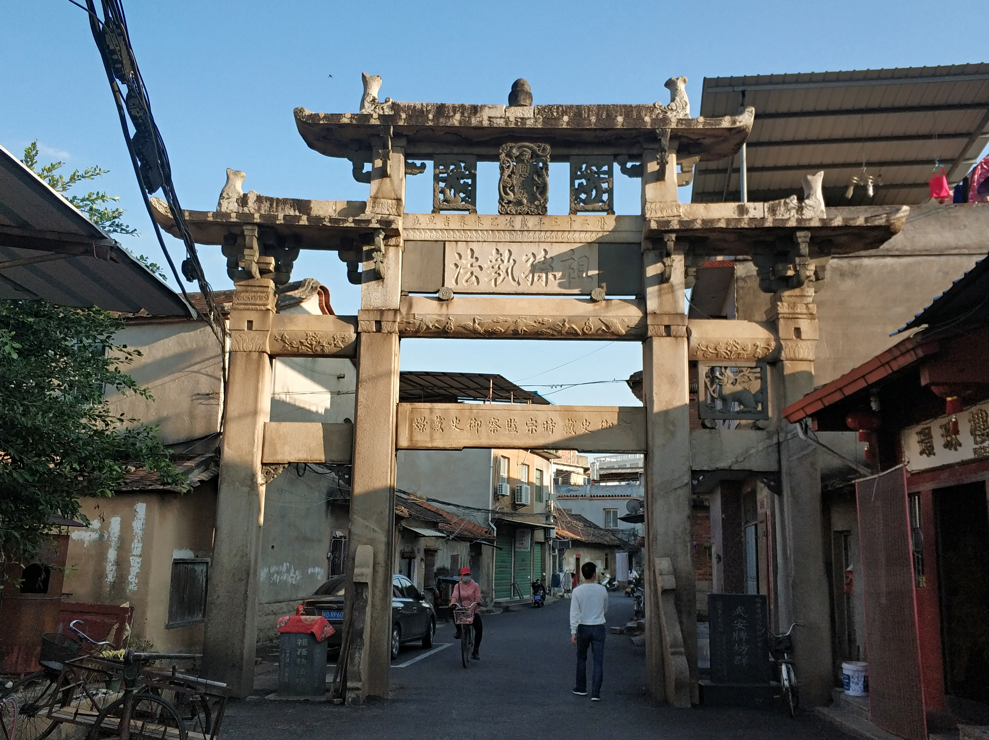 中文（中国大陆）: 祖孙执法坊，四柱三门式，明万历二十三年（1595）为督察院都御史戴时宗及其曾孙后裔曾孙监察御史戴燝立。